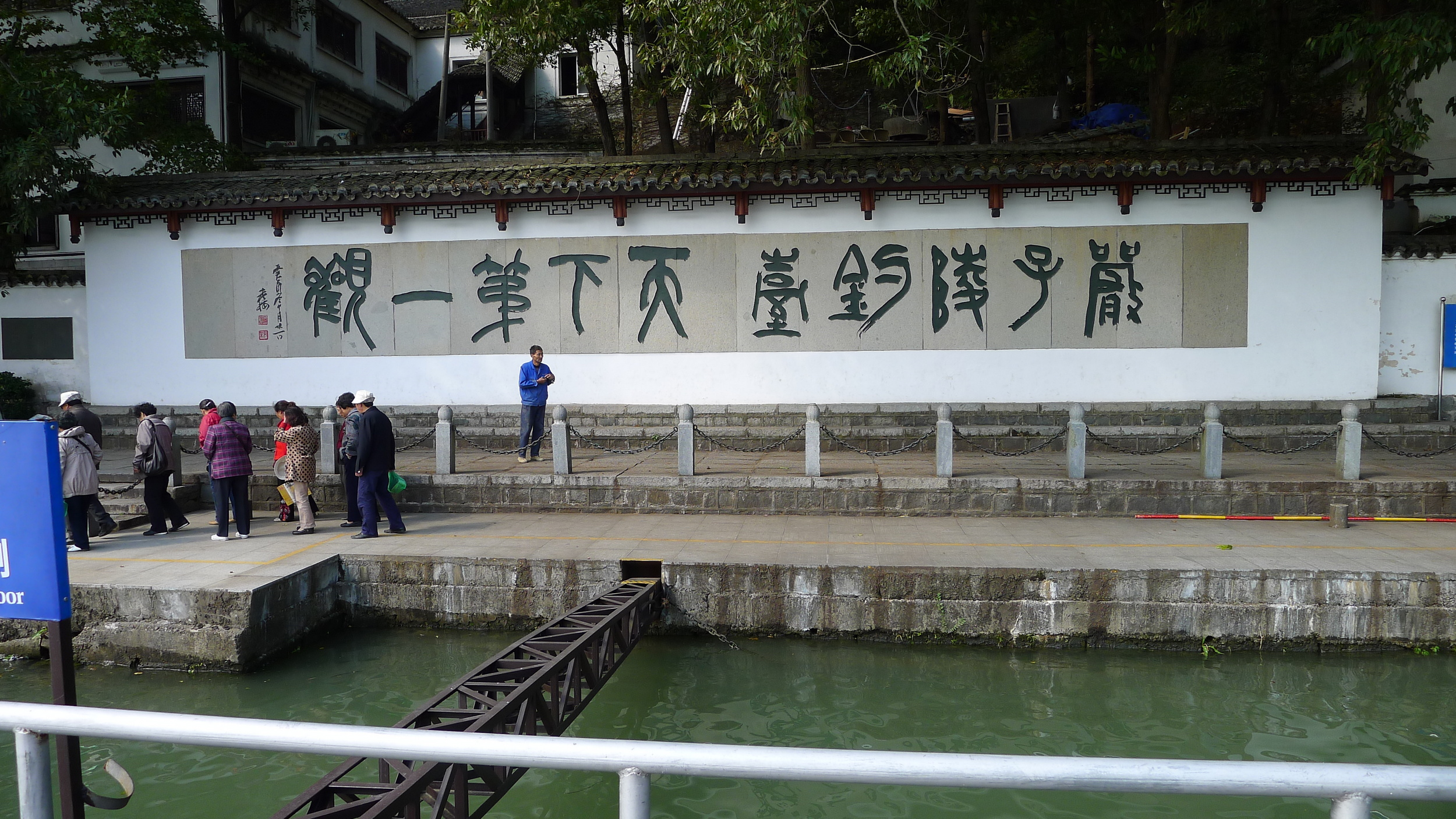 严子陵钓台天下第一观